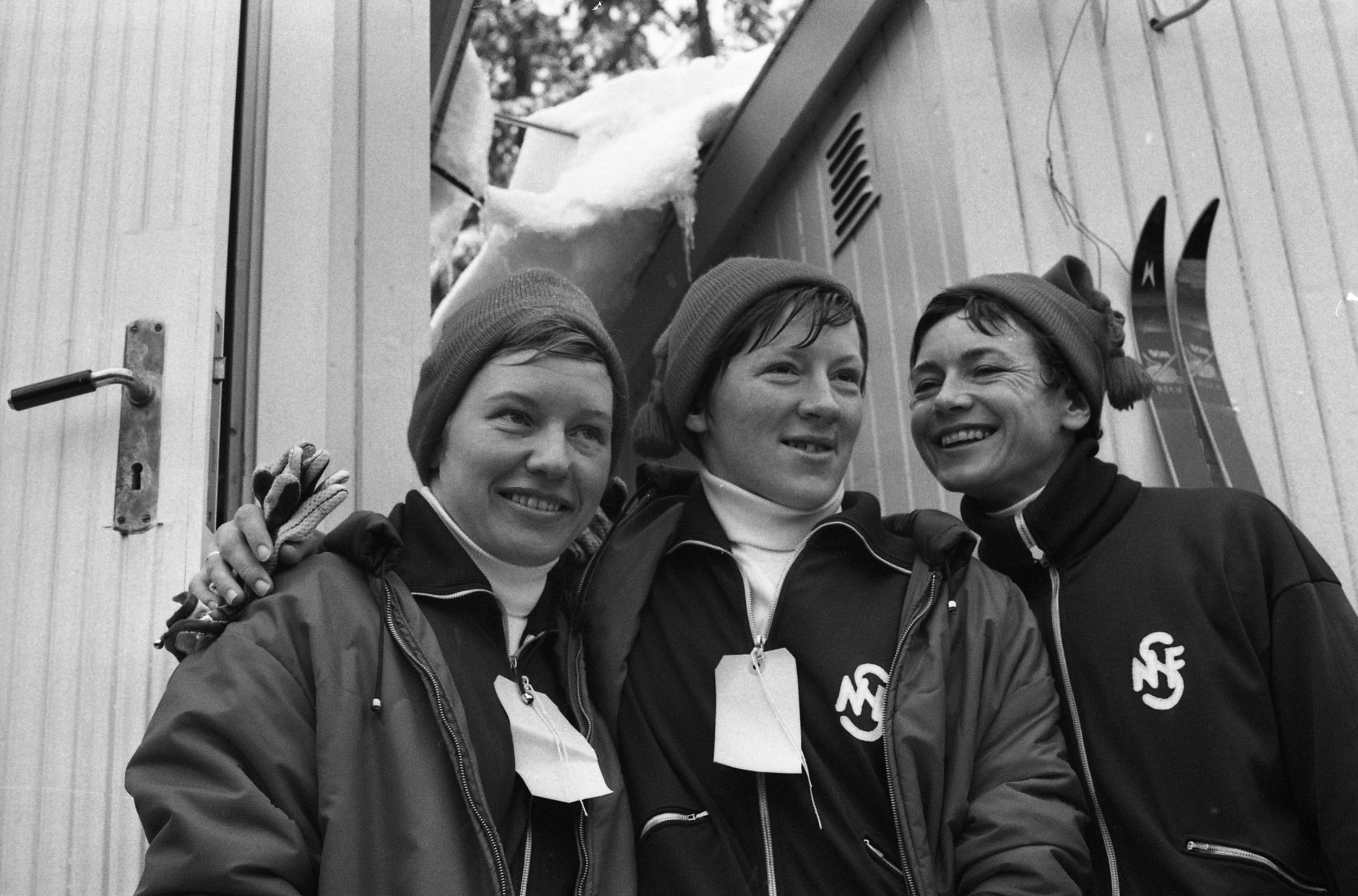 Beskrivelse: Ingrid Wigernæs, Inger Aufles, Berit Mørdre dannet det norske sølvlaget under staffeten for kvinner under verdensmesterskapet på ski i Oslo 1966 Fotograf: Billedbladet NÅ/Klæboe og Lauritzen Sted: Oslo År: 1966 Arkivreferanse: RIKSARKIVET- RA/PA/0797/U/Ua/3893_8a_032